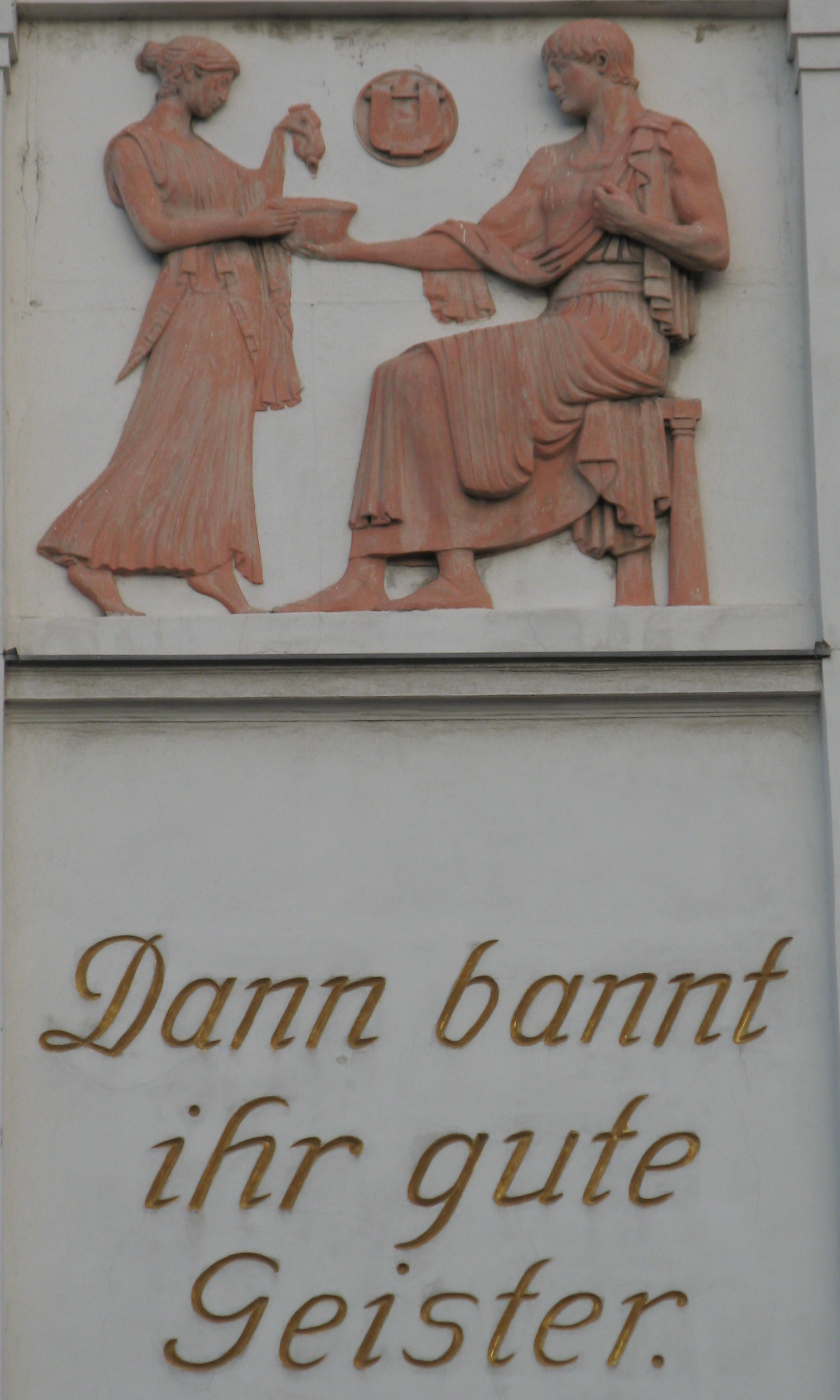 Relief von Ernst Hegenbarth am Wiener Konzerthaus (1912-13)